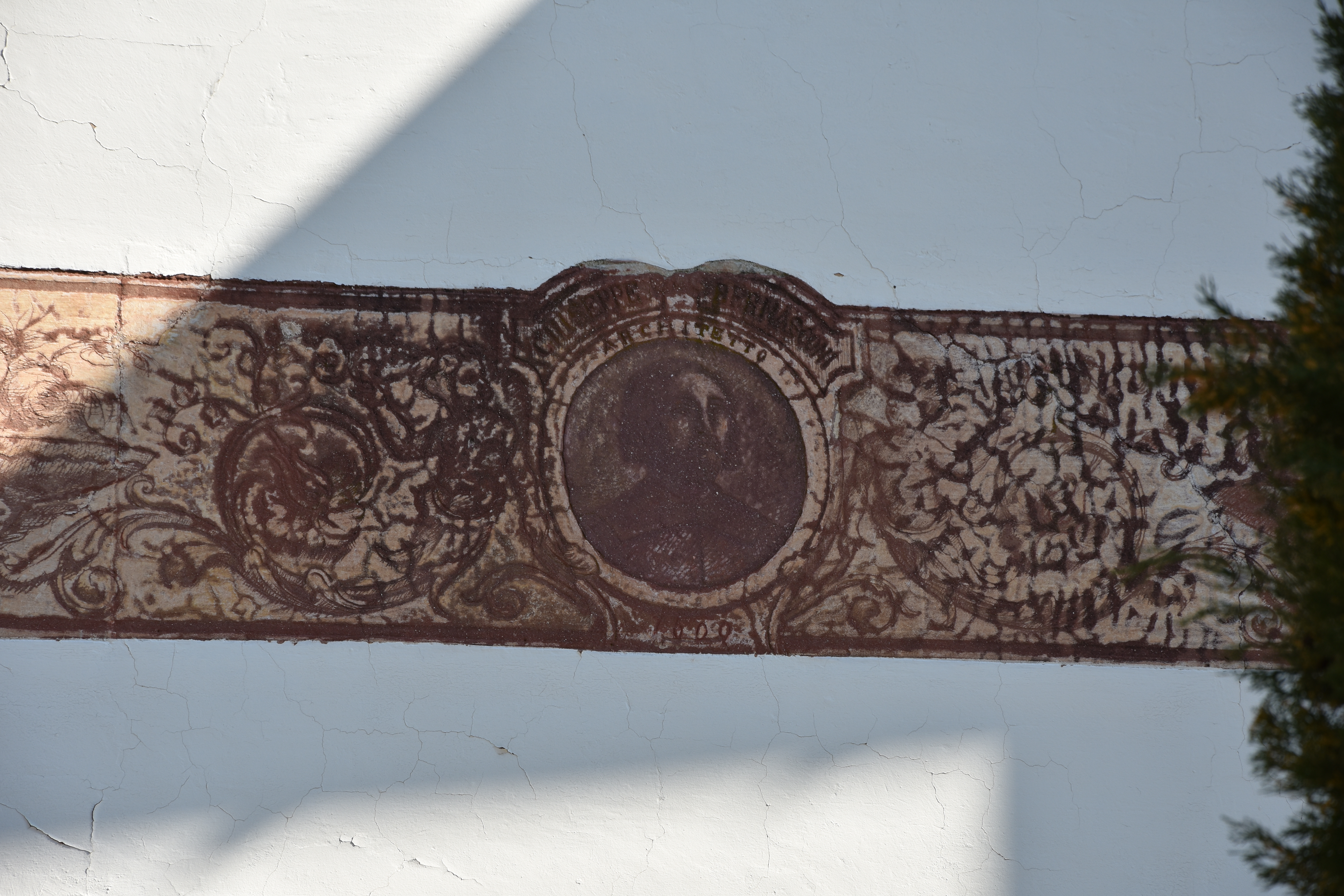 Al principio del percorso del Sacro Monte di Varese.